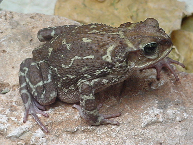 Bufo peltocephalus